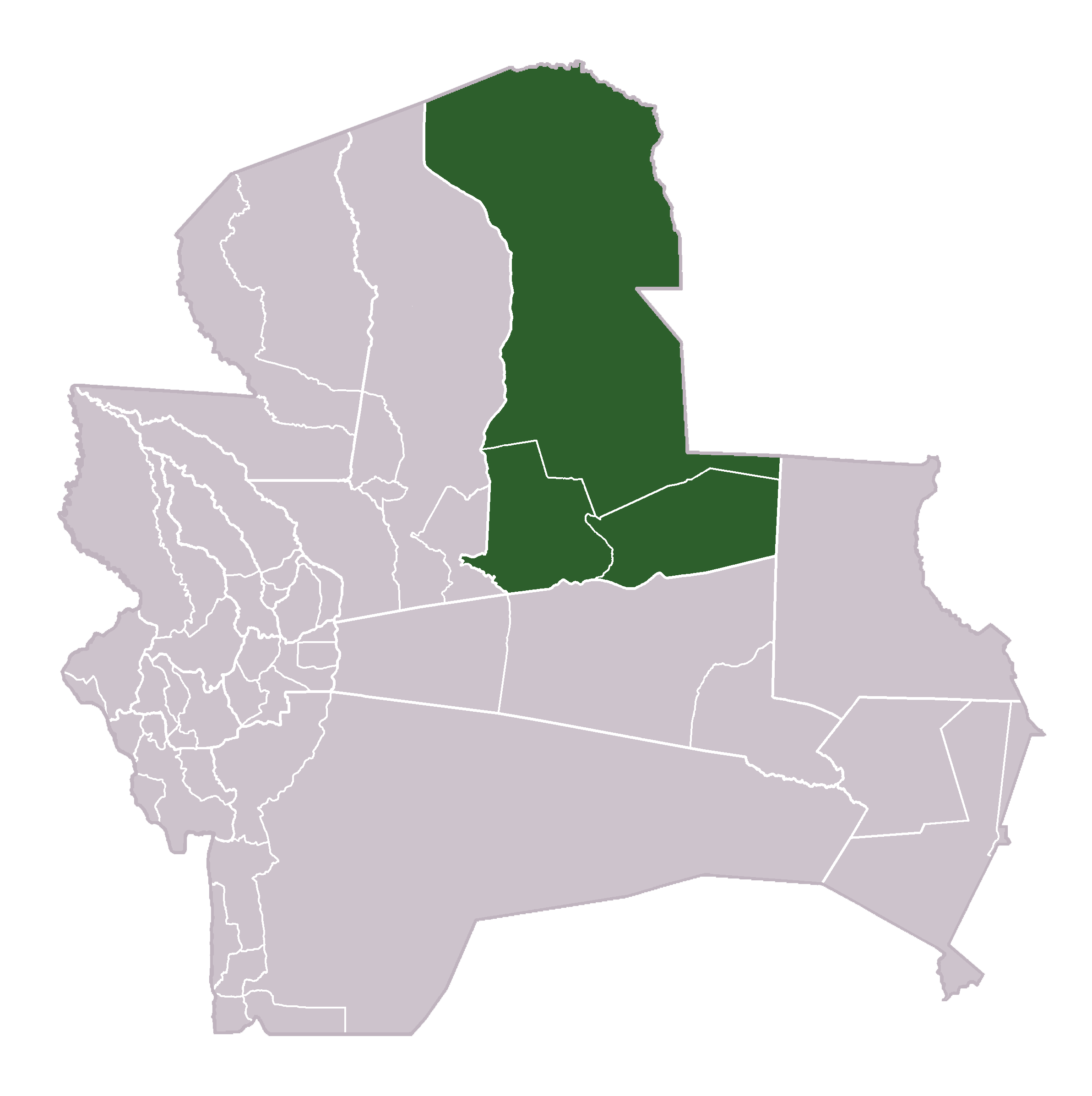 Mapa de la provincia San Miguel de Velasco del Departamento de Santa Cruz, Bolivia.